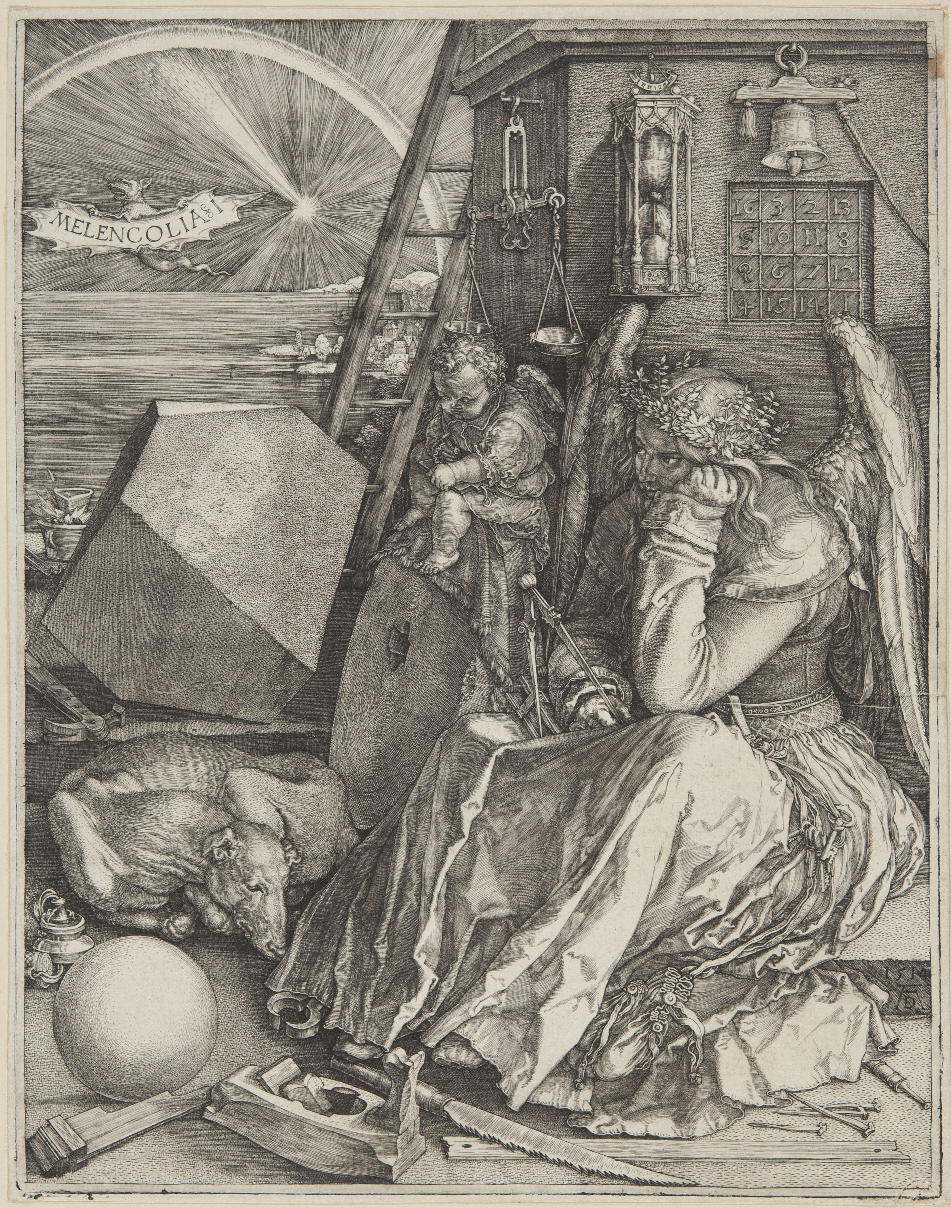 Un ángel apoya su cara en la mano, pensativo. Está rodeado por herramientas y otros objetos de significado alegórico